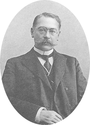 Николай Иванович Блажков, херсонский городской голова, член IV Государственной думы от Херсонской губернии.